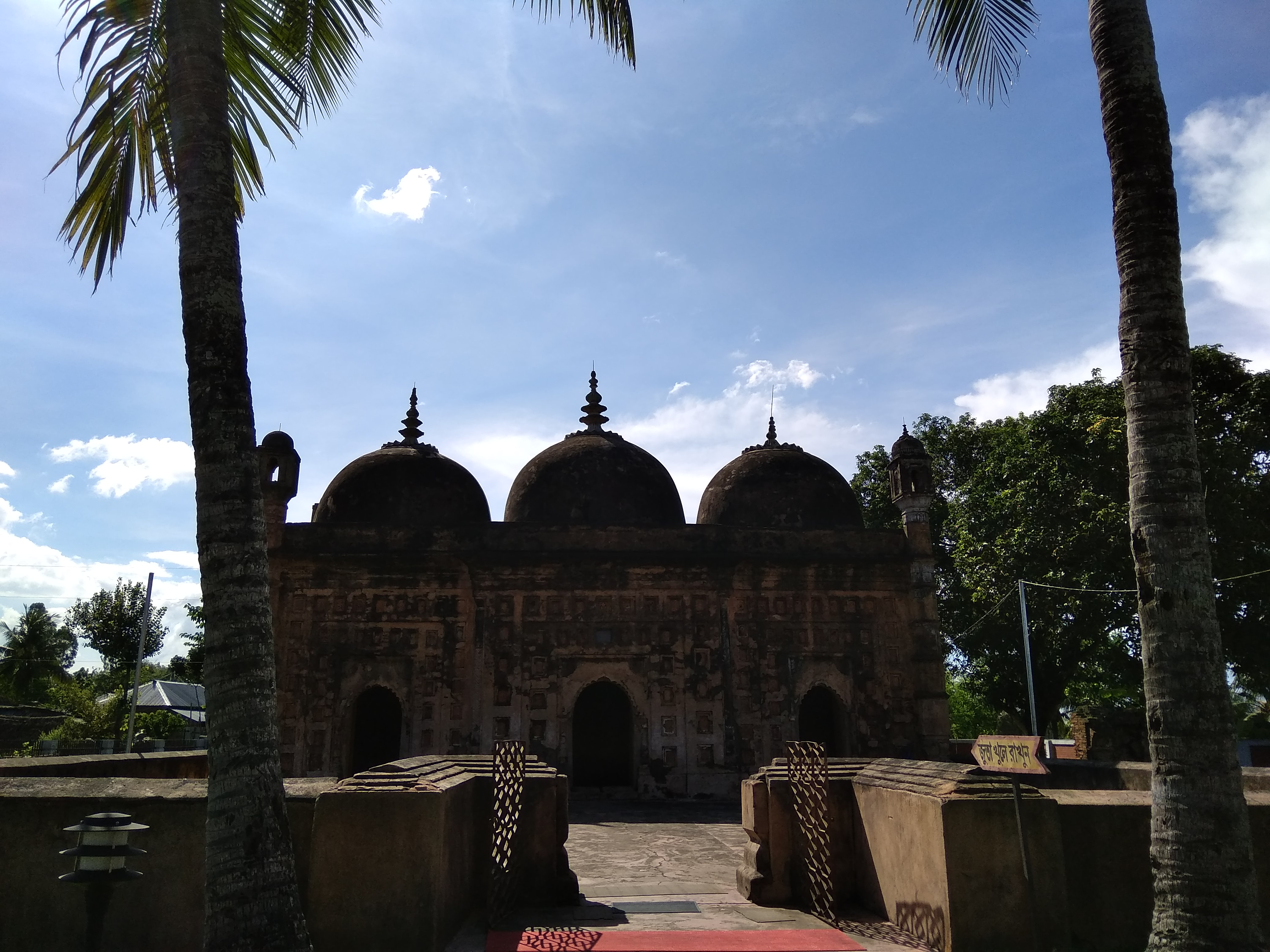 প্রাচীন মসজিদ (নয়াবাদ)